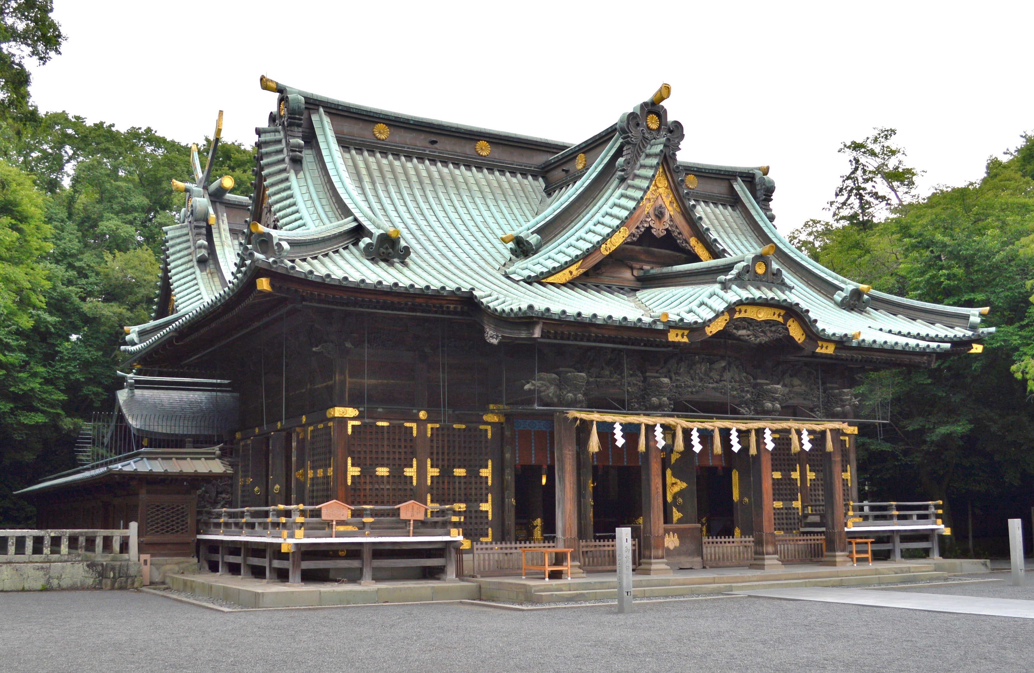 三嶋大社 拝殿 (斜めより)